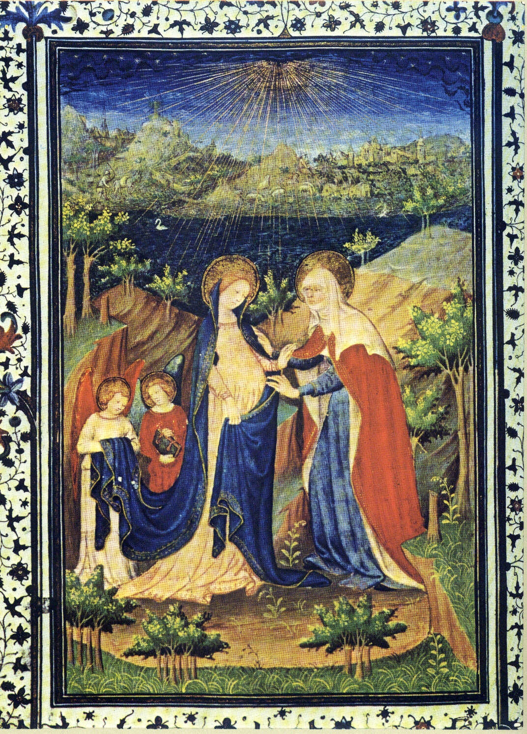 Miniatur Heimsuchung